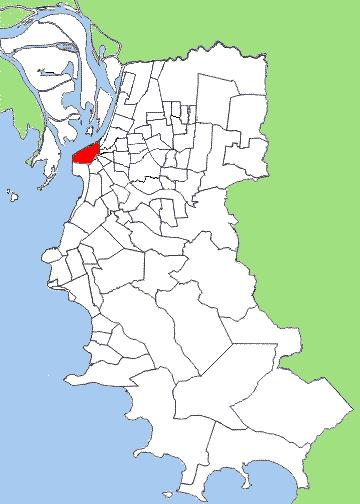 O Centro Histórico de Porto Alegre (em verde escuro), dentro do mapa dos bairros da cidade.